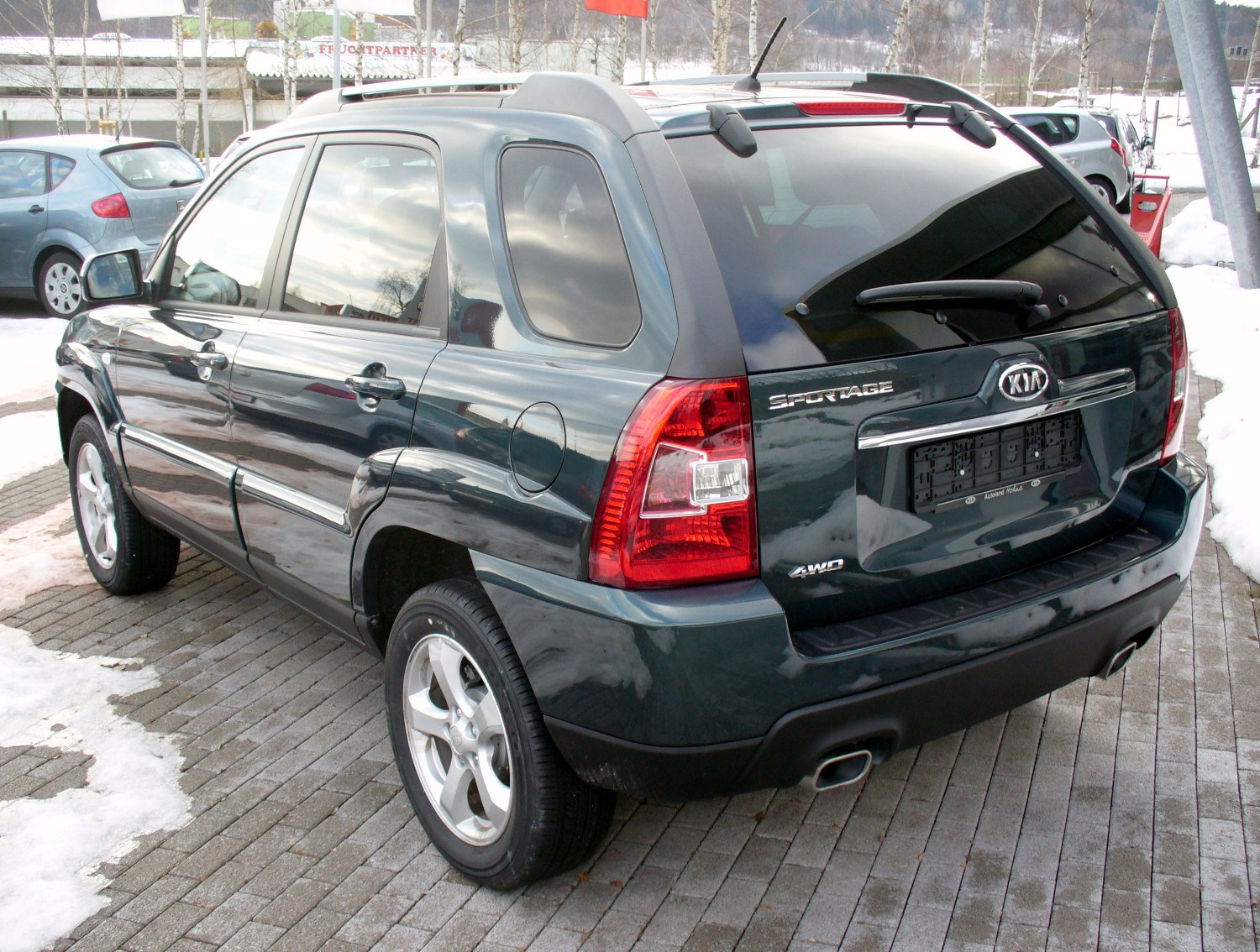 Kia Sportage